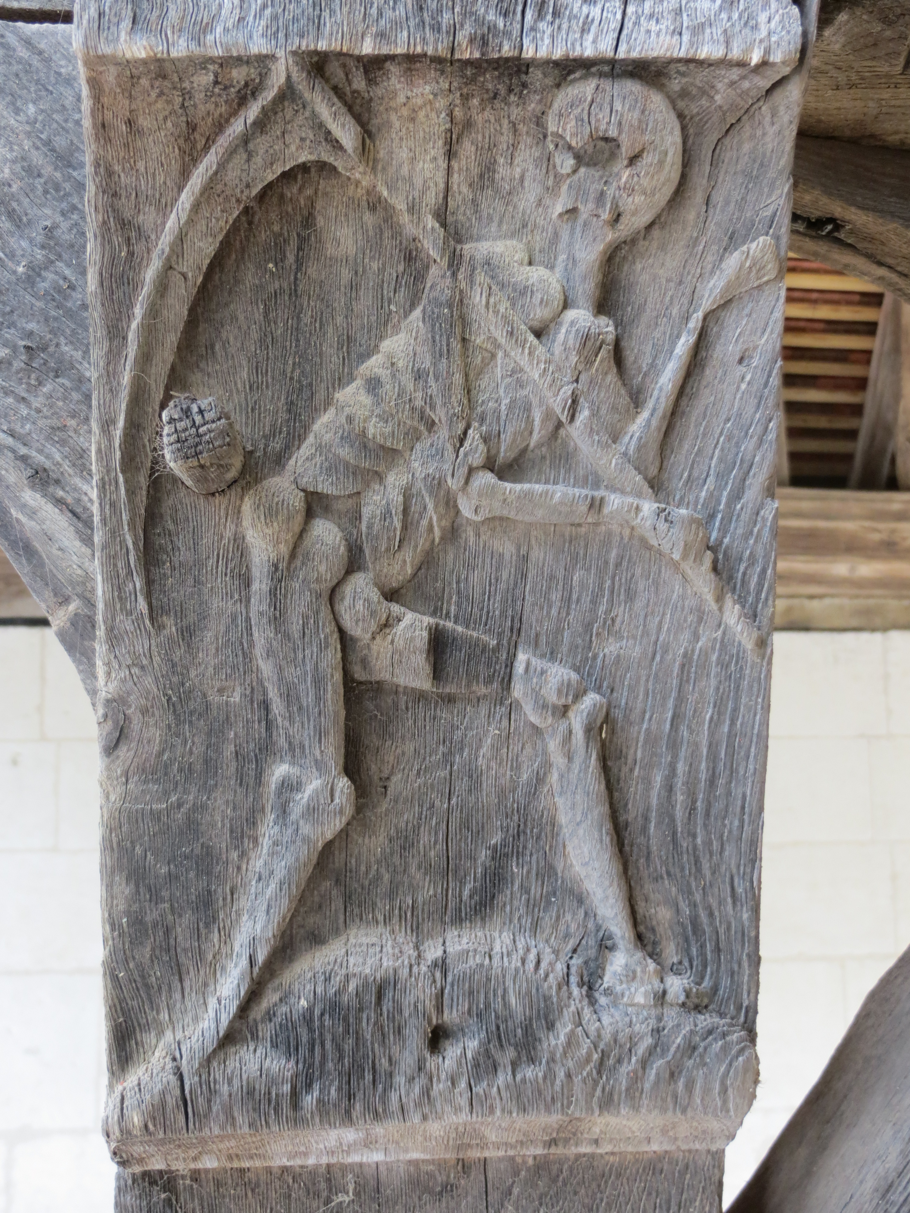 représentation macabre sur un pigeatre de la galerie de l'aître de Brisgaret